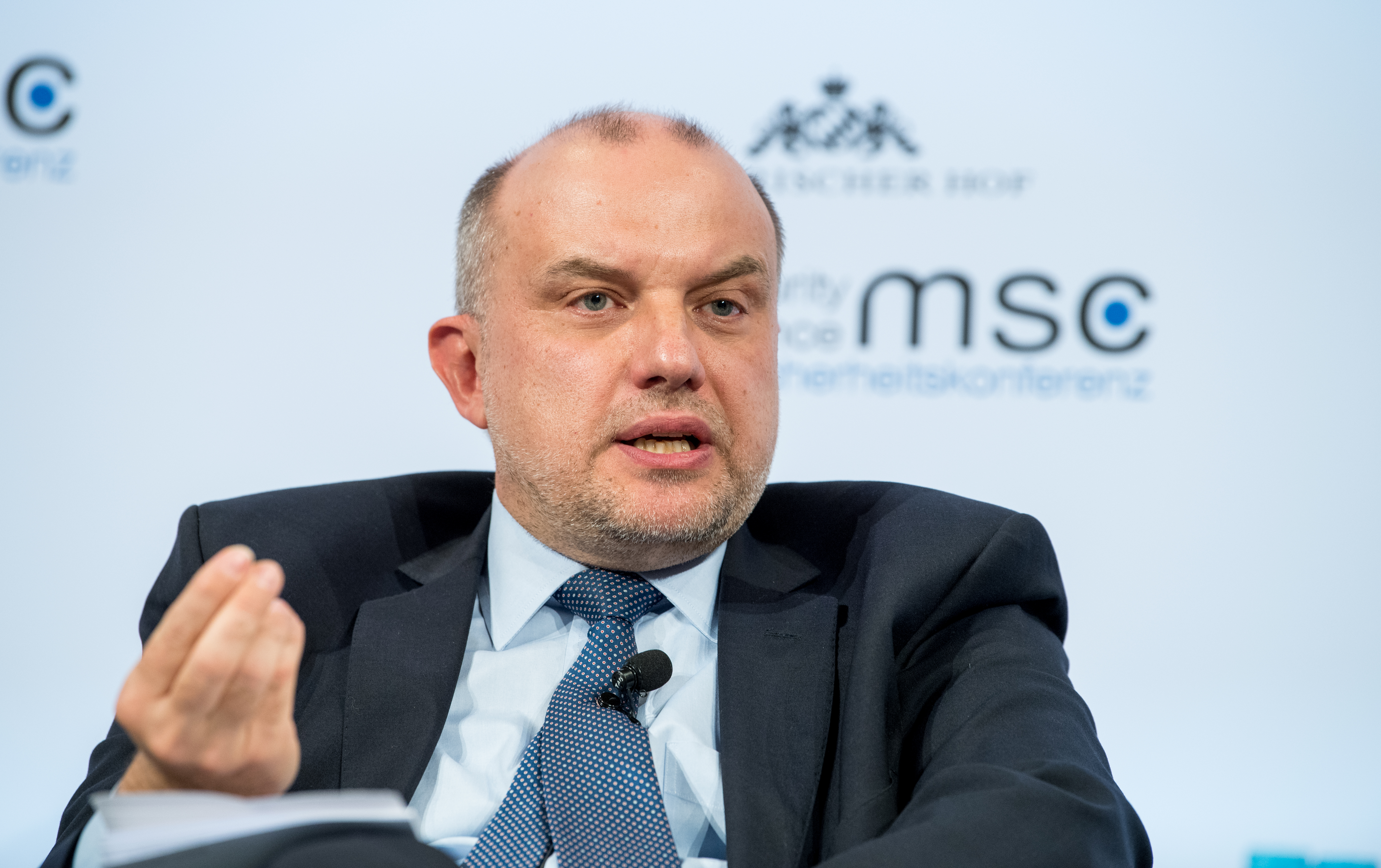 Jüri Luik während der Münchener Sicherheitskonferenz 2018